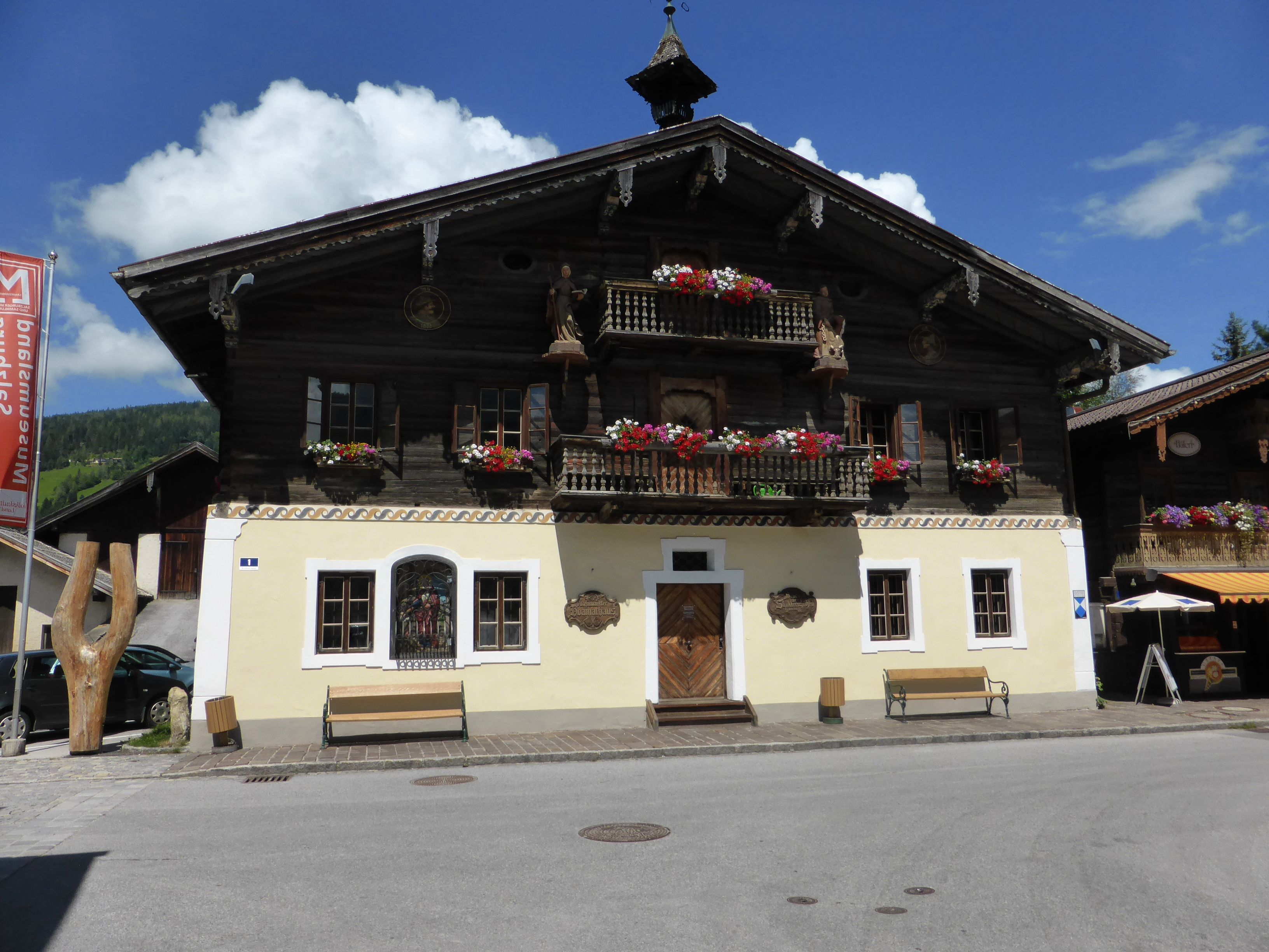 Heimatmuseum Altenmarkt im Pongau